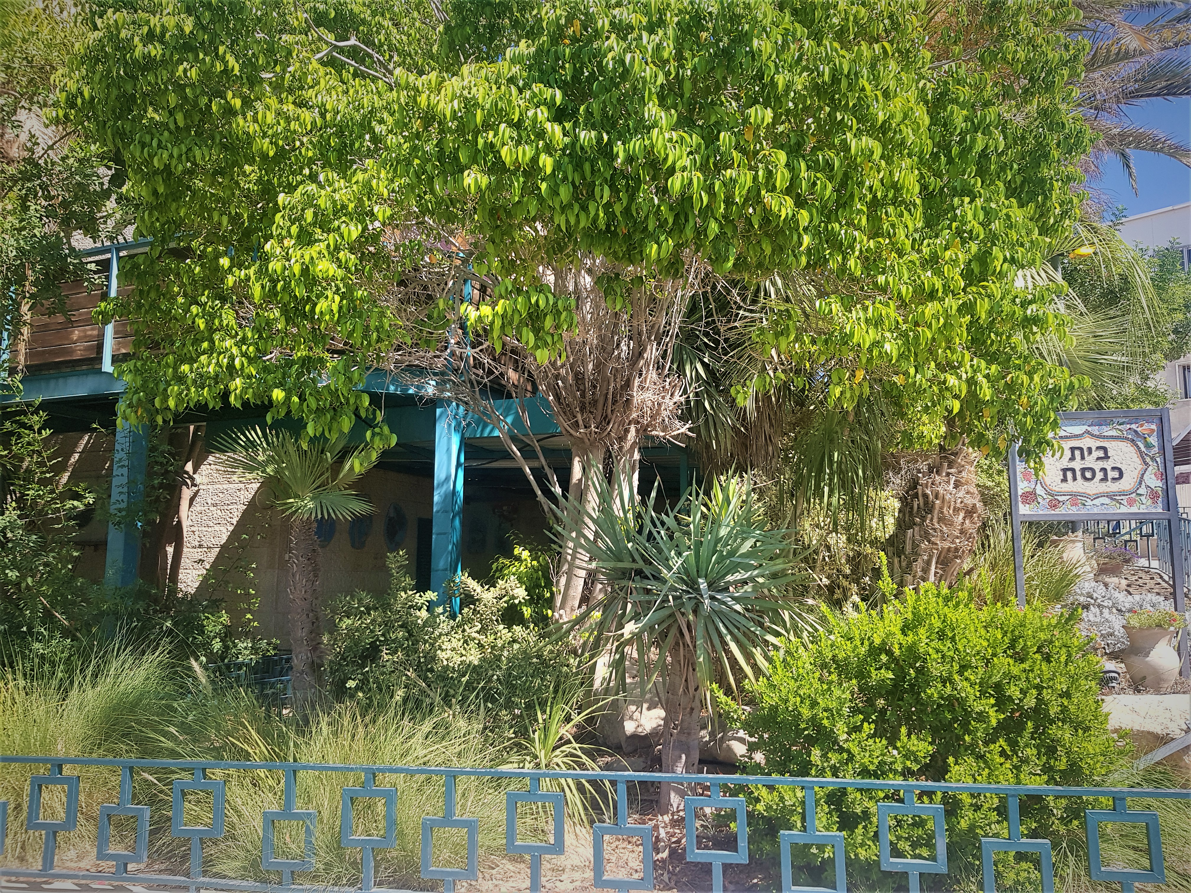 הכניסה לבית הכנסת